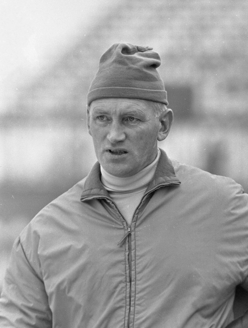 Kees Broekman